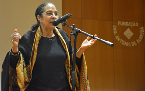 Olinda Beja na Fundação Eng. António de Almeida